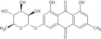 Frangulina A